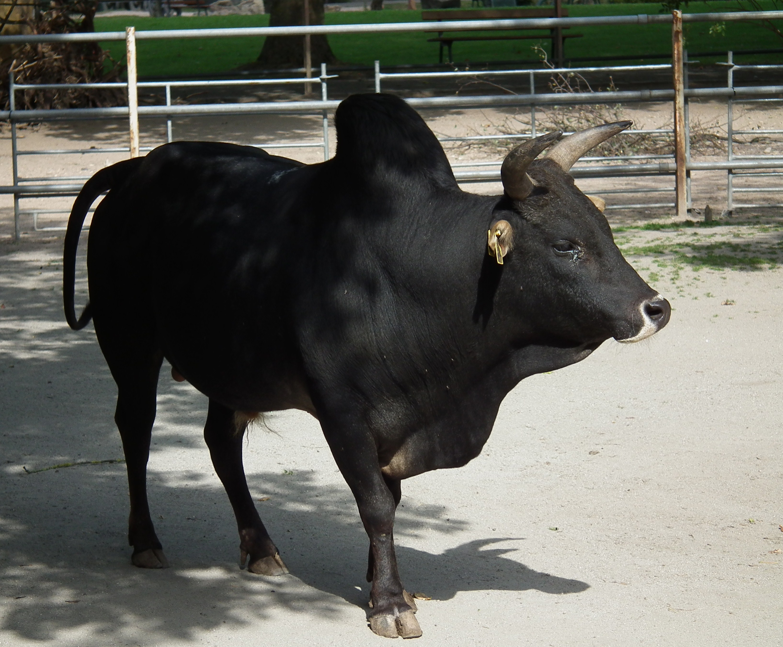 Zwergzebu (Bos taurus indicus) im Tiergarten Worms (Rheinland-Pfalz, Deutschland)